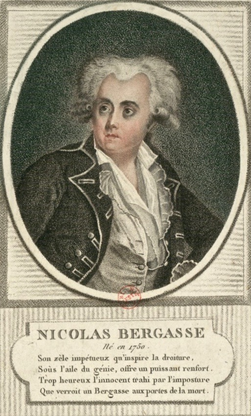 Romany: Nicolas Bergasse (1750–1832), französischer Advokat und Politiker, 1788/89 Prozessgegner von Pierre-Augustin Caron de Beaumarchais, der ihn 1792 zum Bösewicht Bégearss (Anagramm) in seinem Drama "La mère coupable" (letztes Stück der Figaro-Trilogie) machte. Bibliothèque nationale de France.